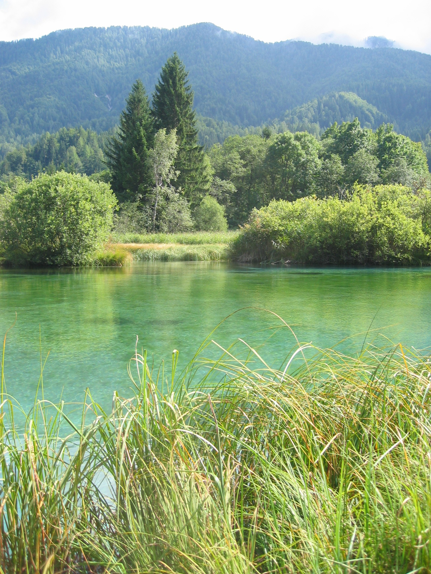 Zelenci, izvir Save Dolinke. izdelal: --Ziga 19:11, 30 september 2005 (CEST)